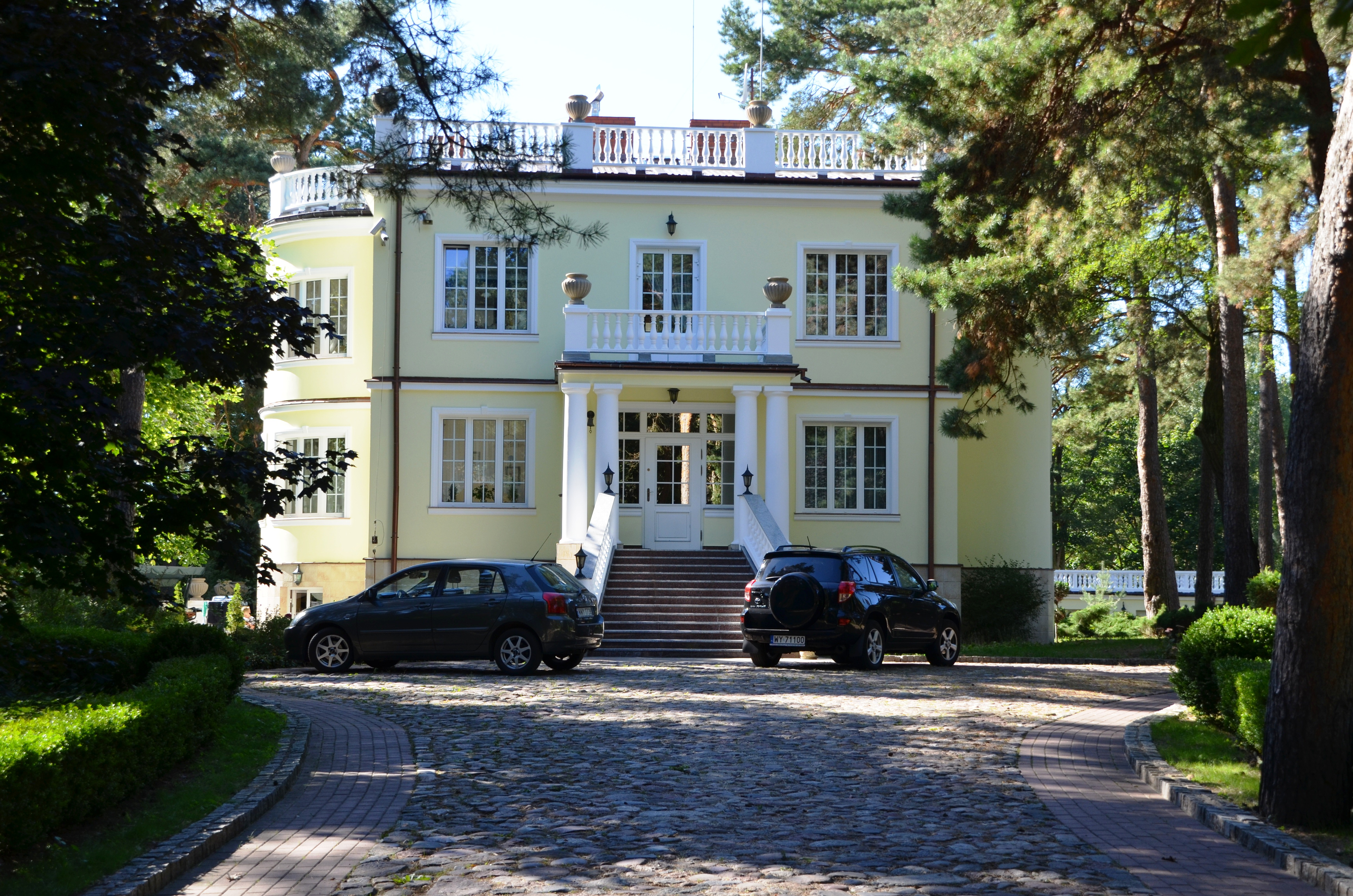 Wyszków (Rybienko Leśne), willa Siewierzanka, 1933-1936